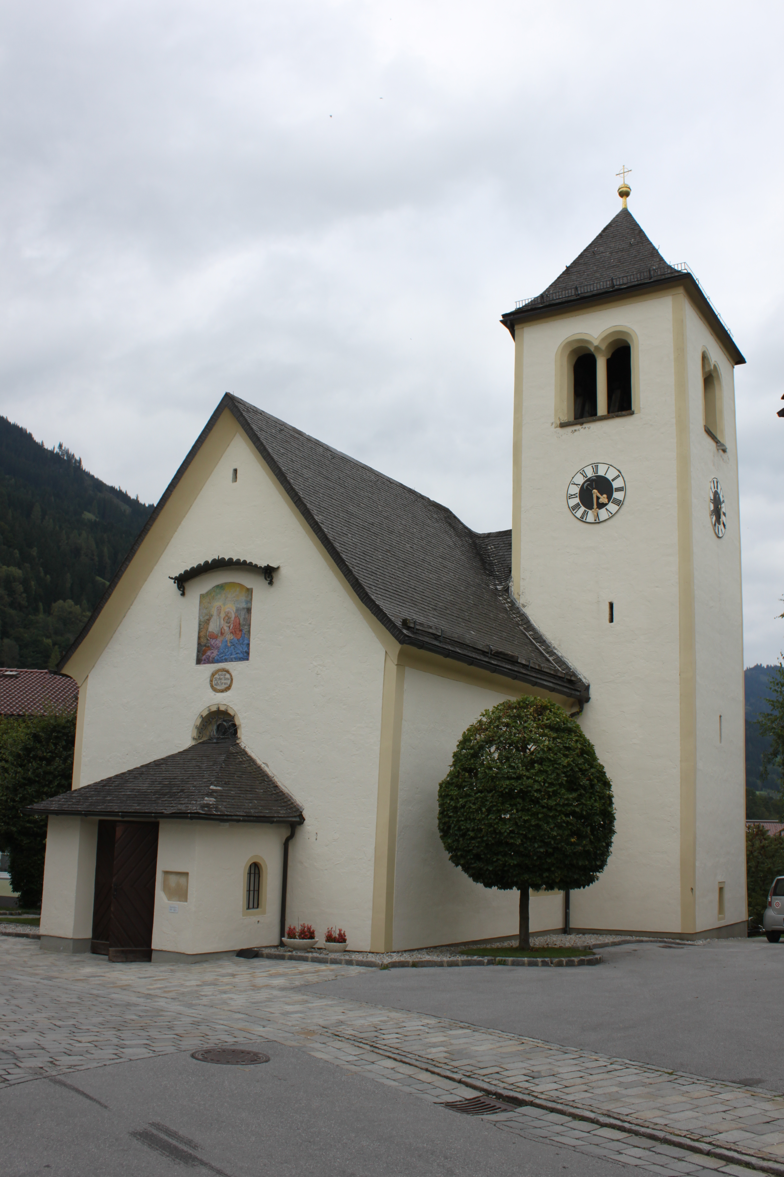 Kath. Filialkirche hl. Anna